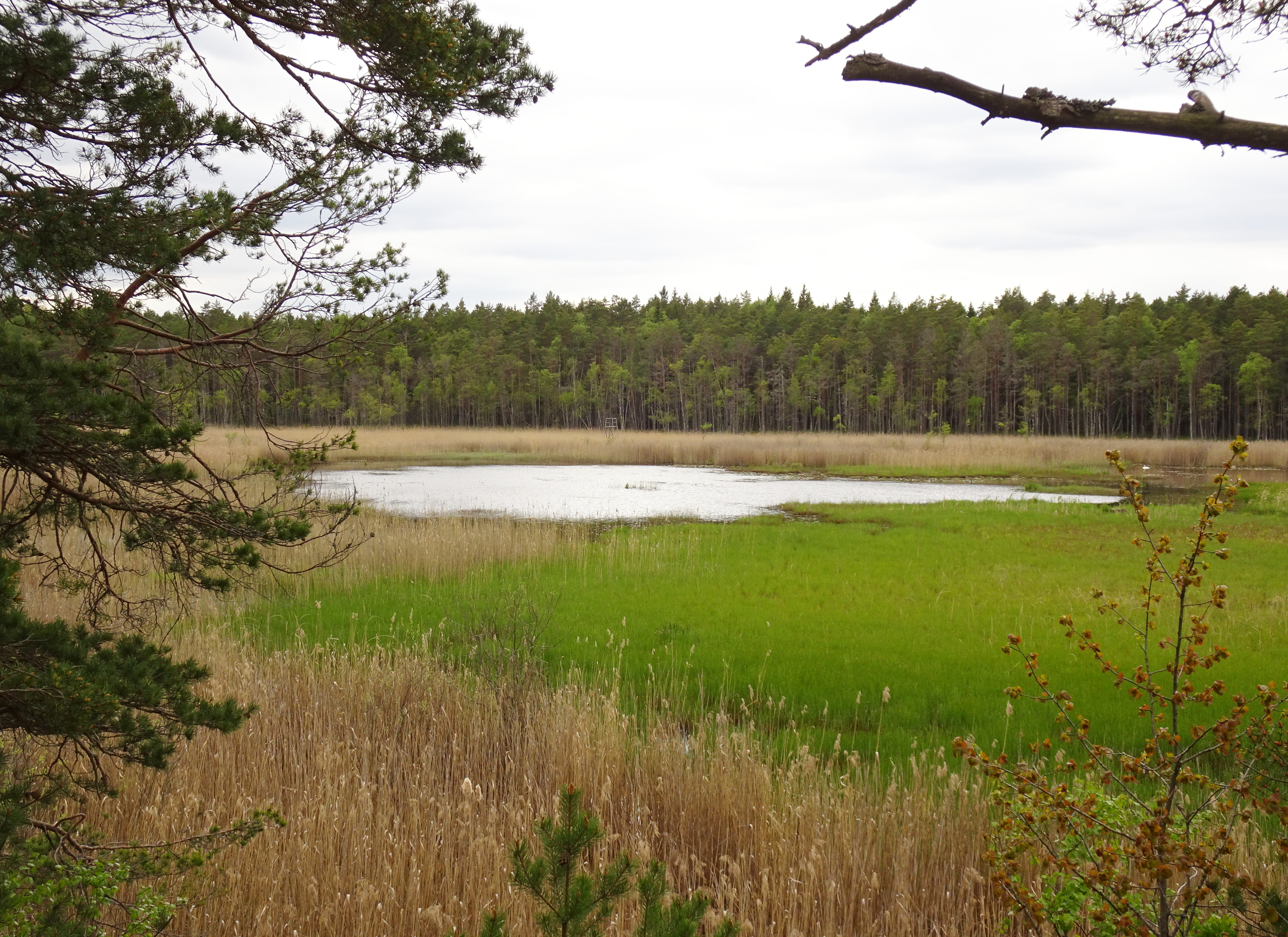 Acksjön i Salemns kommun